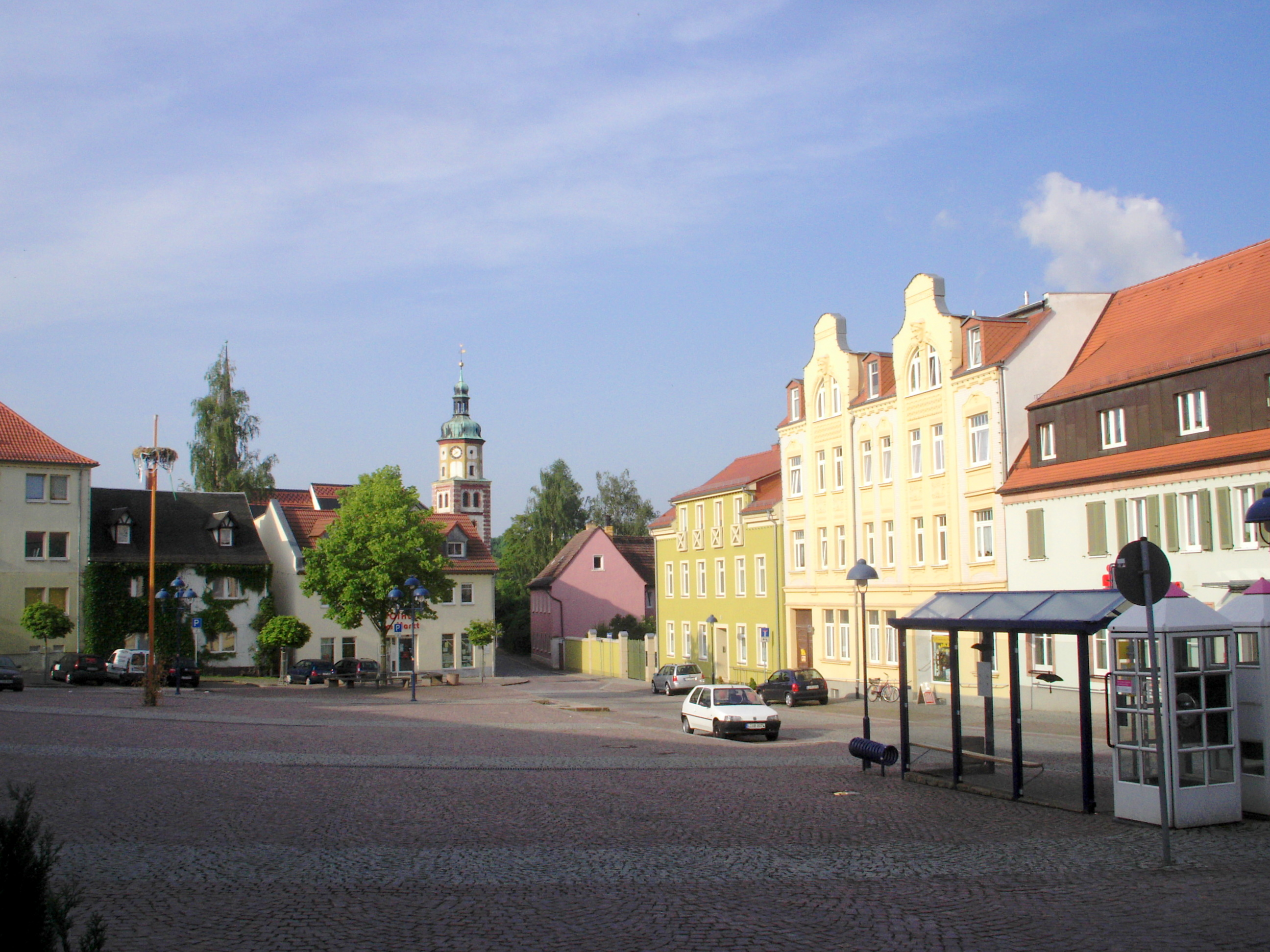 Rötha, Markt